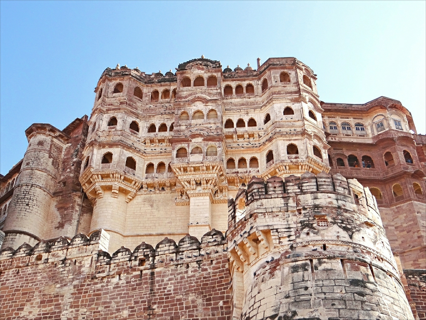 Le fort de Mehrangarh de Jodhpur, ville située dans l'État du Rajasthan (Inde), est l'un des plus imposants forts que compte l'Inde. Surnommé le fort magnifique, il surplombe la ville du haut de ses 122 mètres. À l'intérieur de celui-ci se trouve un palais richement décoré et agrémenté de nombreuses cours. Extrait de l'article de Wikipedia sur le fort Meherangarh